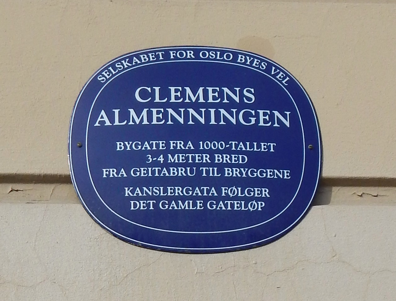 Blått skilt til minne om Clemensalmenningen på husveggen i Kanslergata